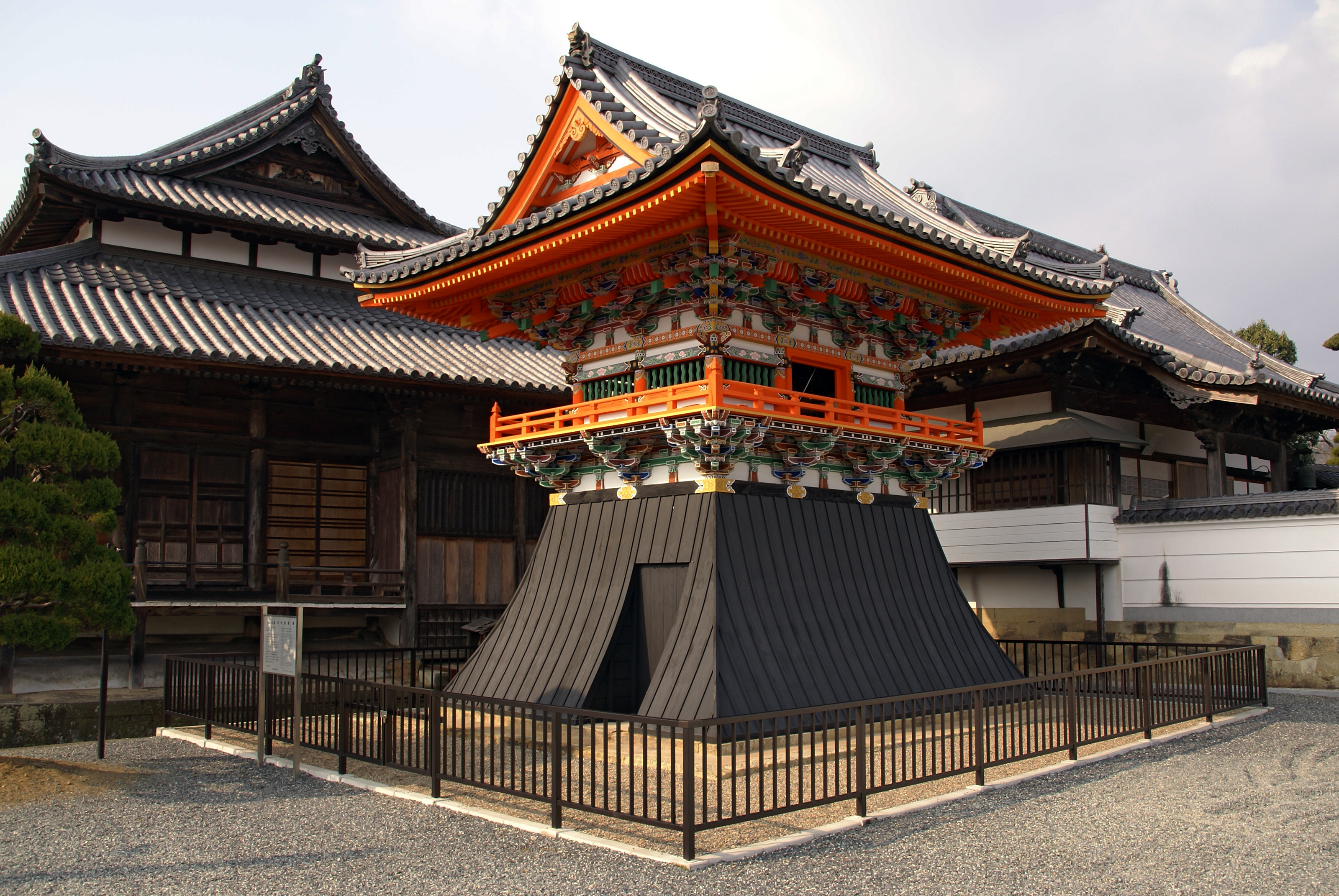 Sagamiji in Kasai, Hyogo, Japan